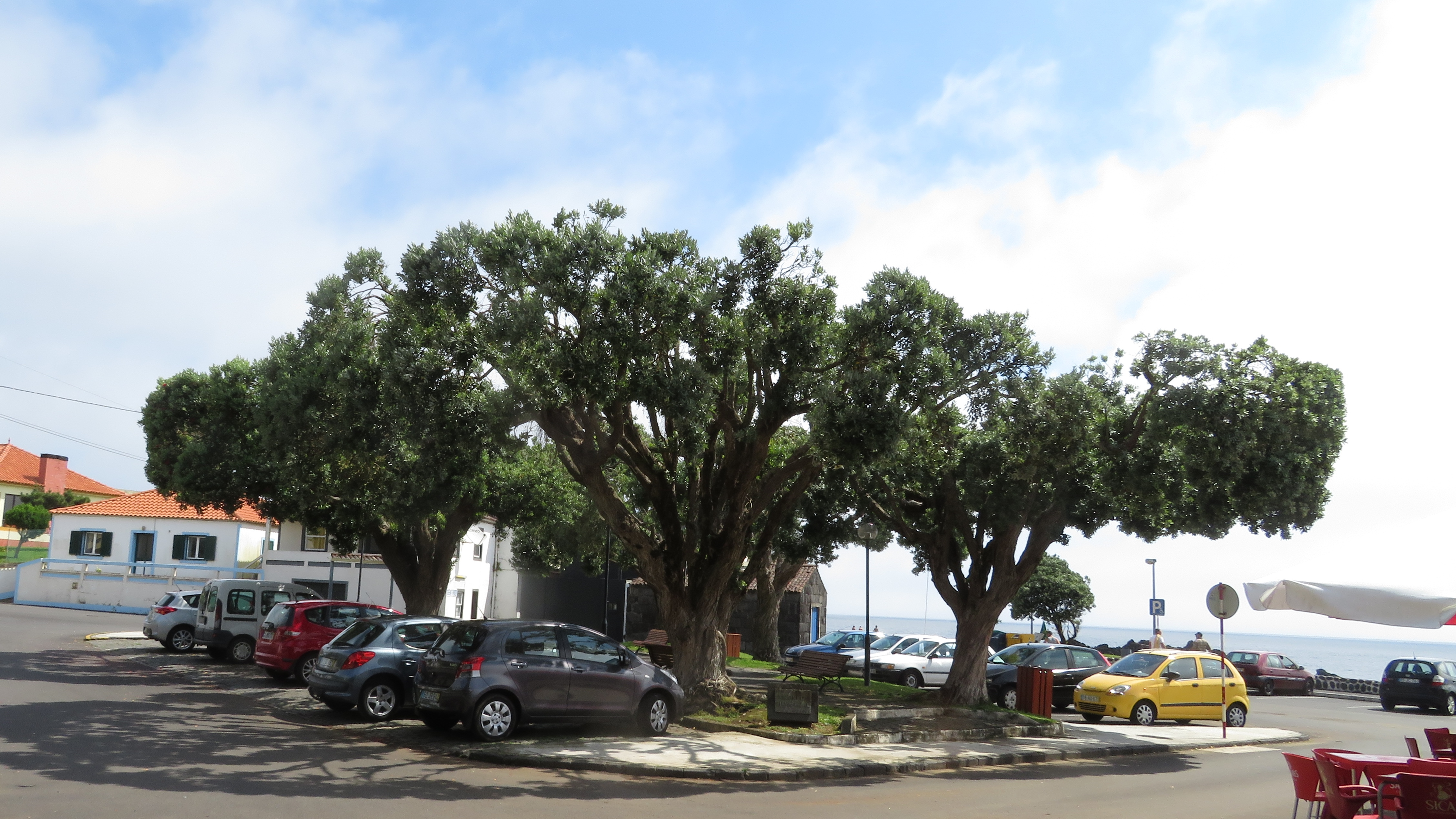 Zentraler Platz "Largo Coronel Silva Leal", Praia do Almoxarife, Insel Faial, Azoren, Portugal